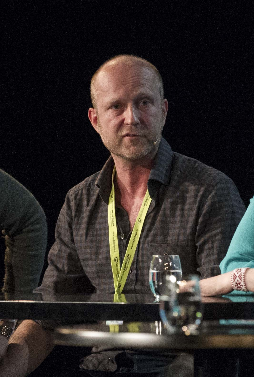 Medvirkende: Petter Bae Brandtzæg (SINTE ), Ola Stenberg (VG), Ingeborg Volan (NKR). Moderator: Anders Waage Nilsen (Netlife Research)